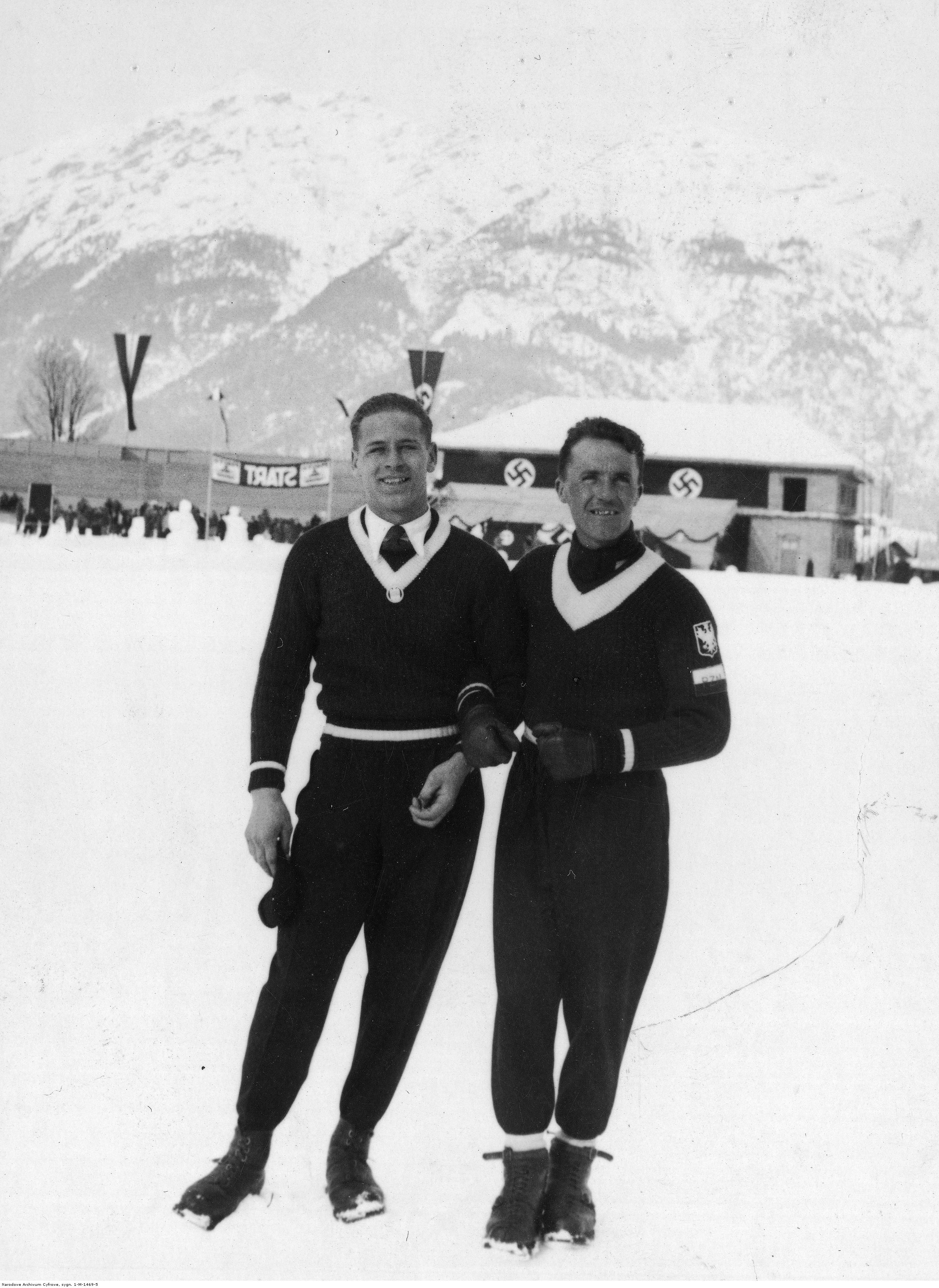 Międzynarodowe Zawody Narciarskie w Garmisch-Partenkirchen 1935. Narciarze Stanisław Marusarz i Bronisław Czech (z prawej) podczas zawodów. (Koncern Ilustrowany Kurier Codzienny - Archiwum Ilustracji)